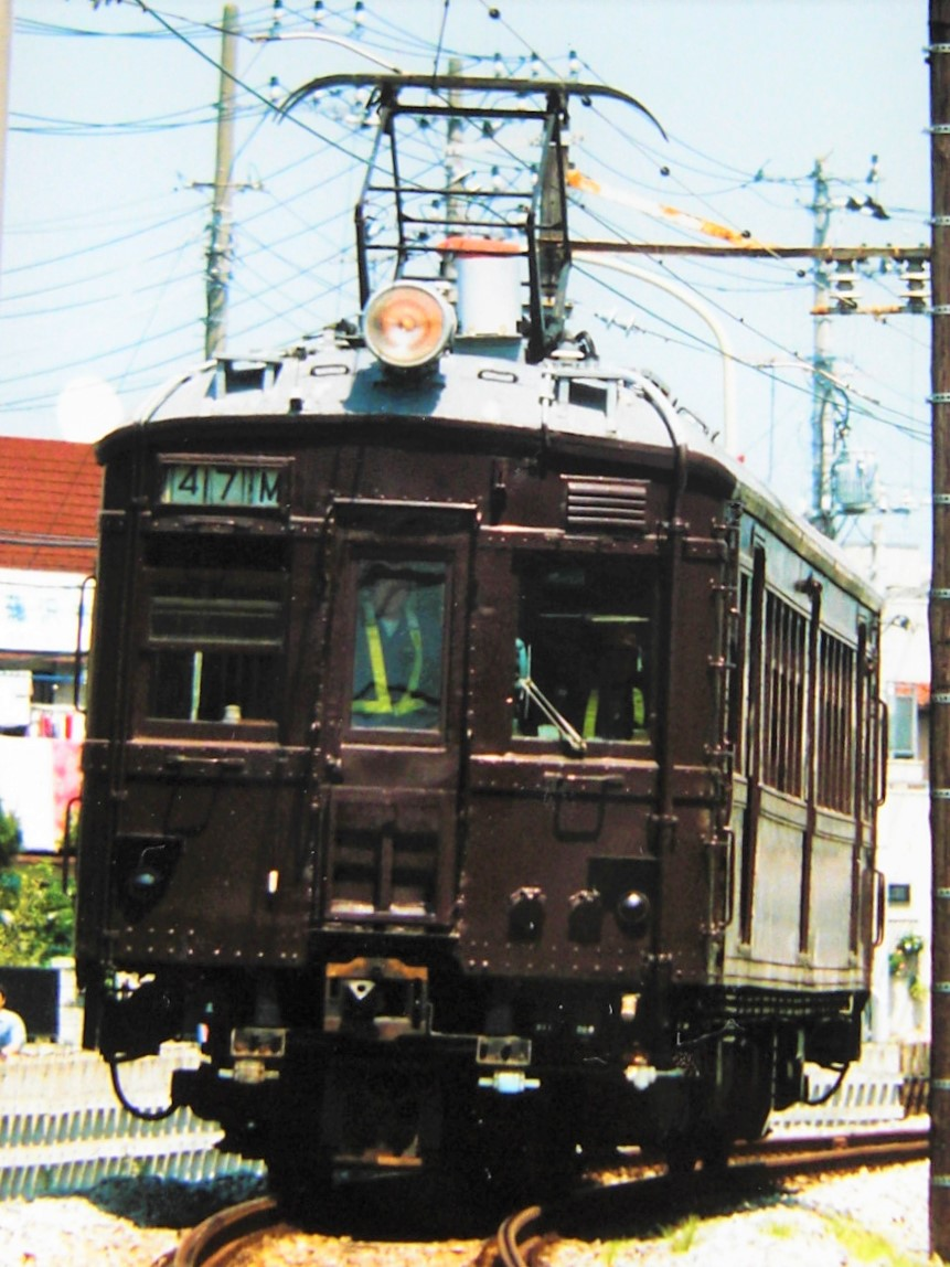 鉄道省 モハ40形電車 40074